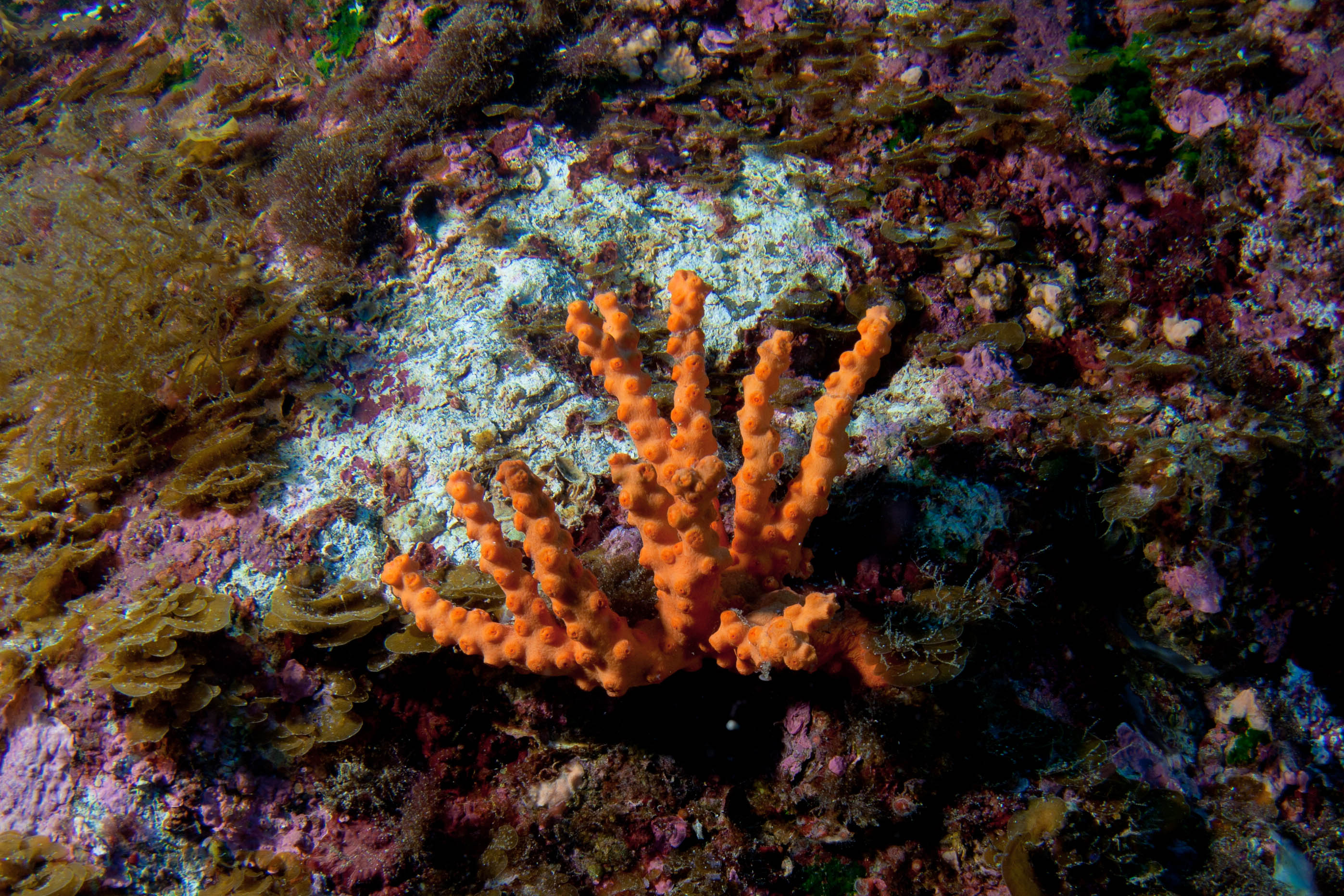 Dendrophyllia cribrosa aka オノミチキ